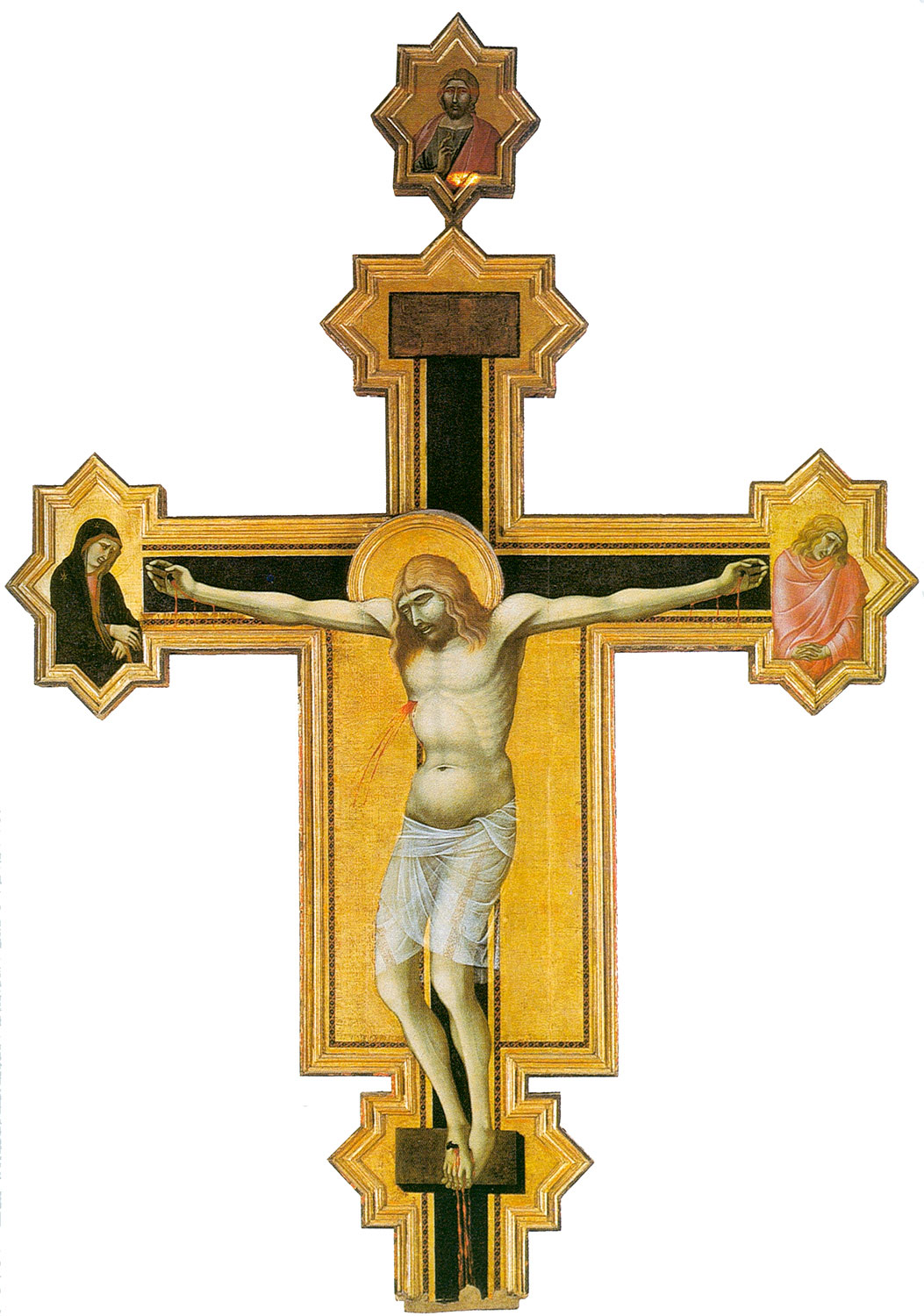 Crucifix-Pietro_Lorenzetti_Cortona